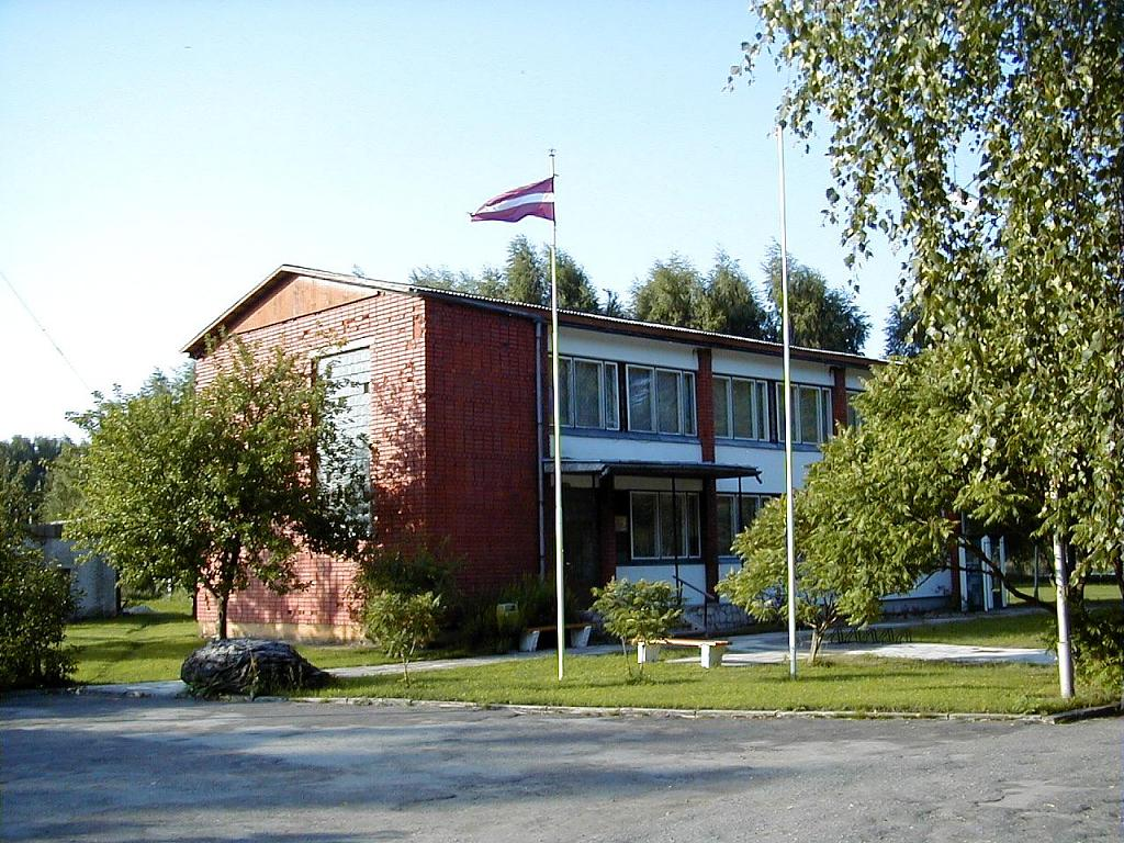 Matkules pagastnams 2002-07-10